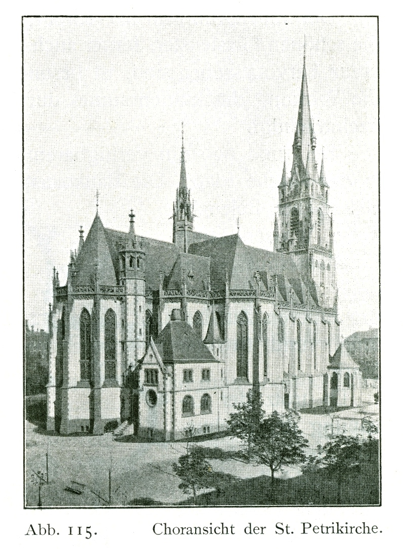 Kirche St. Peter in Düsseldorf-Friedrichstadt, 1898, Architekt Caspar Clemens Pickel,_Choransicht außen.jpg